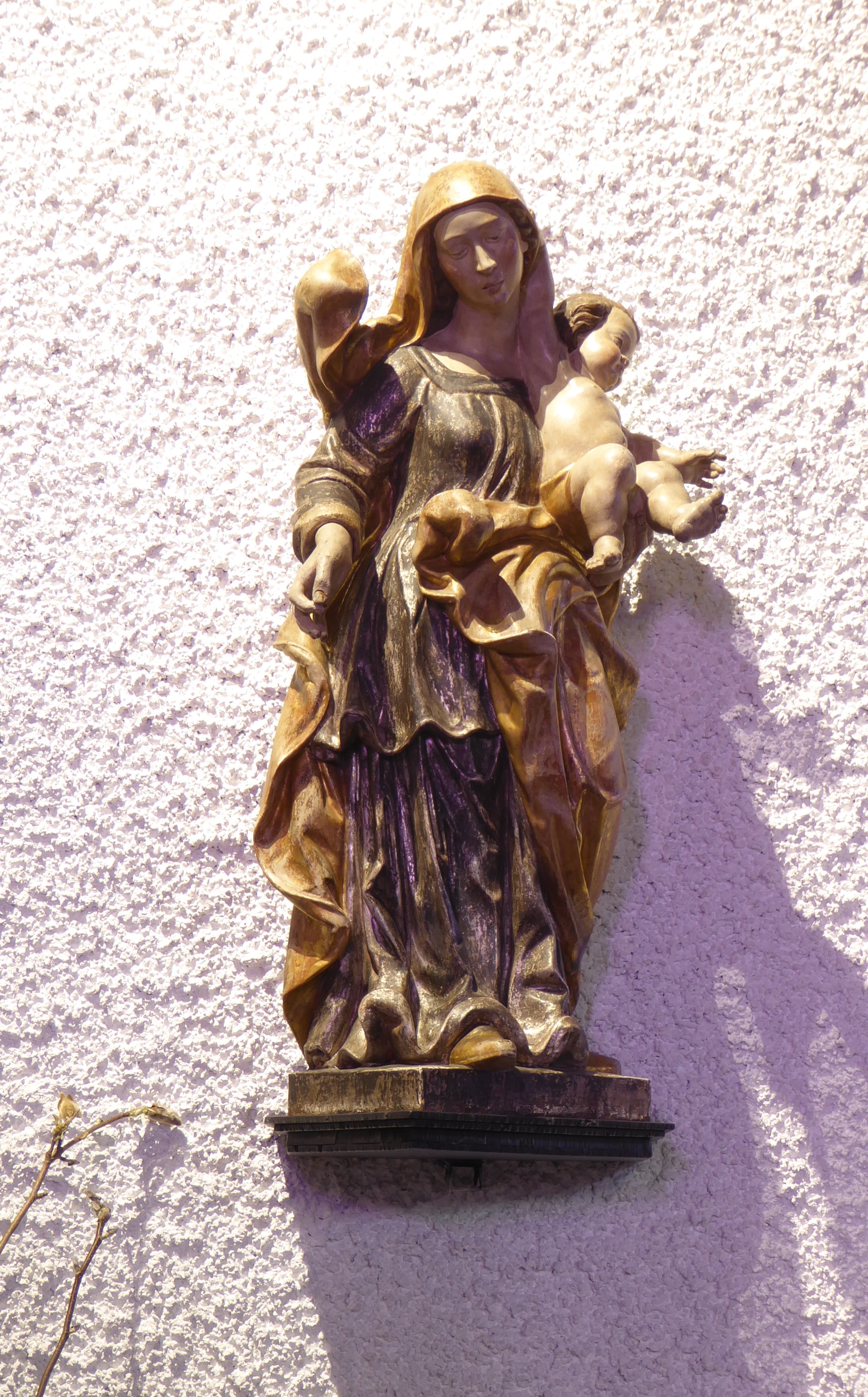 Pfarrkirche Schellenberg FL: Madonna